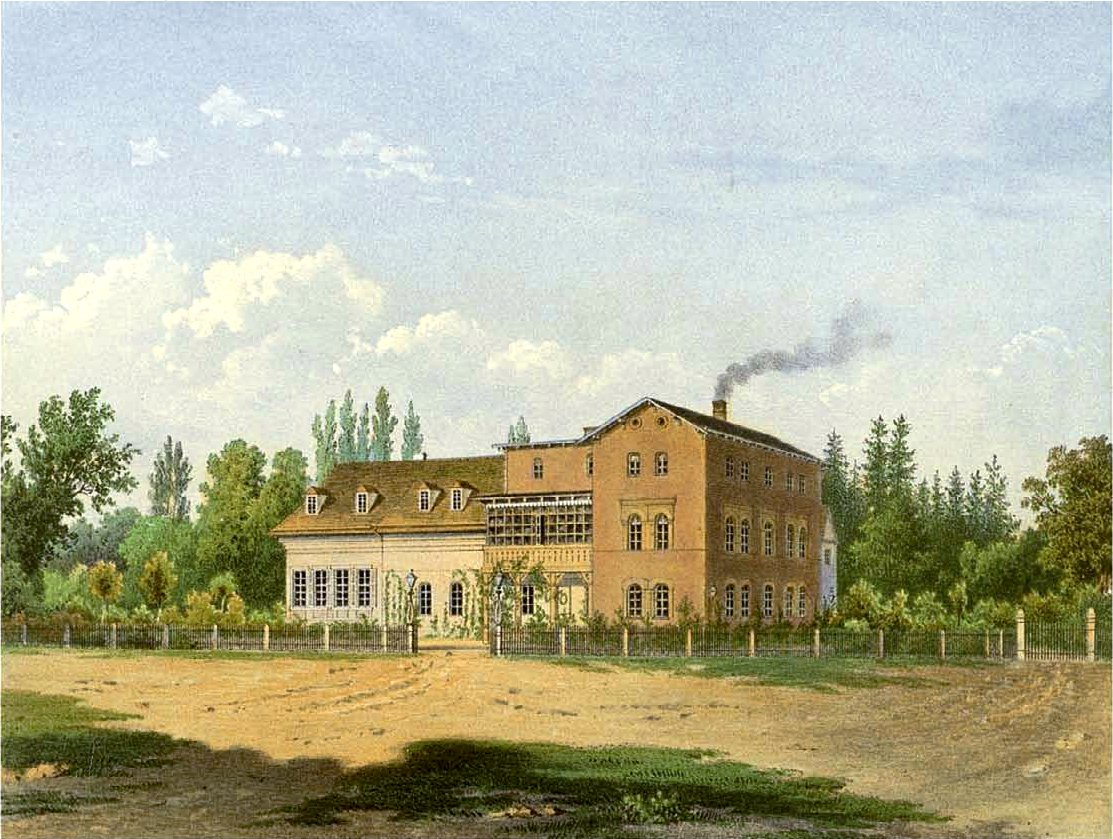 Rittergut Döbernitz, Lithografie aus dem 19. Jahrhundert